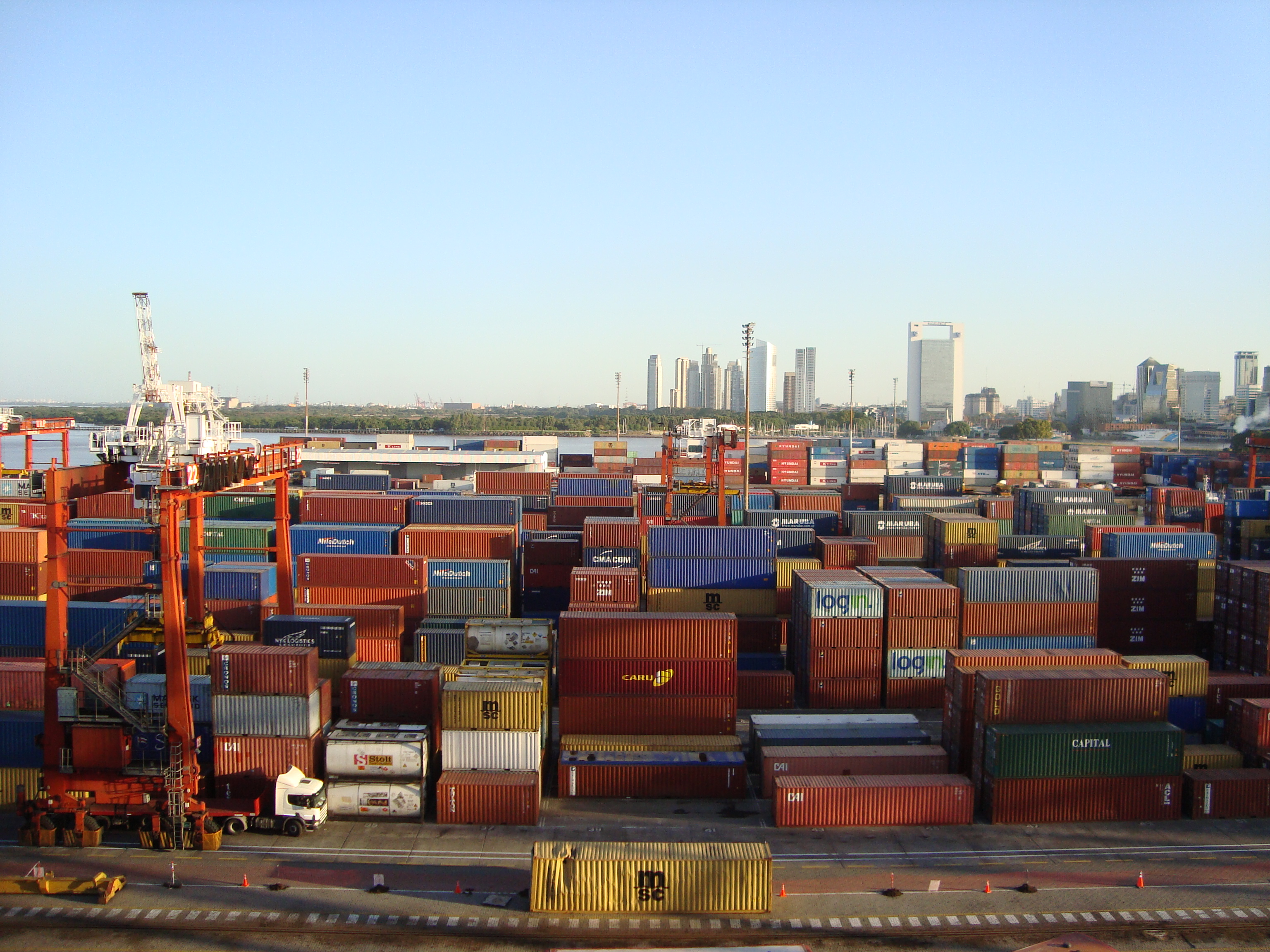 Puerto Nuevo, Buenos Aires